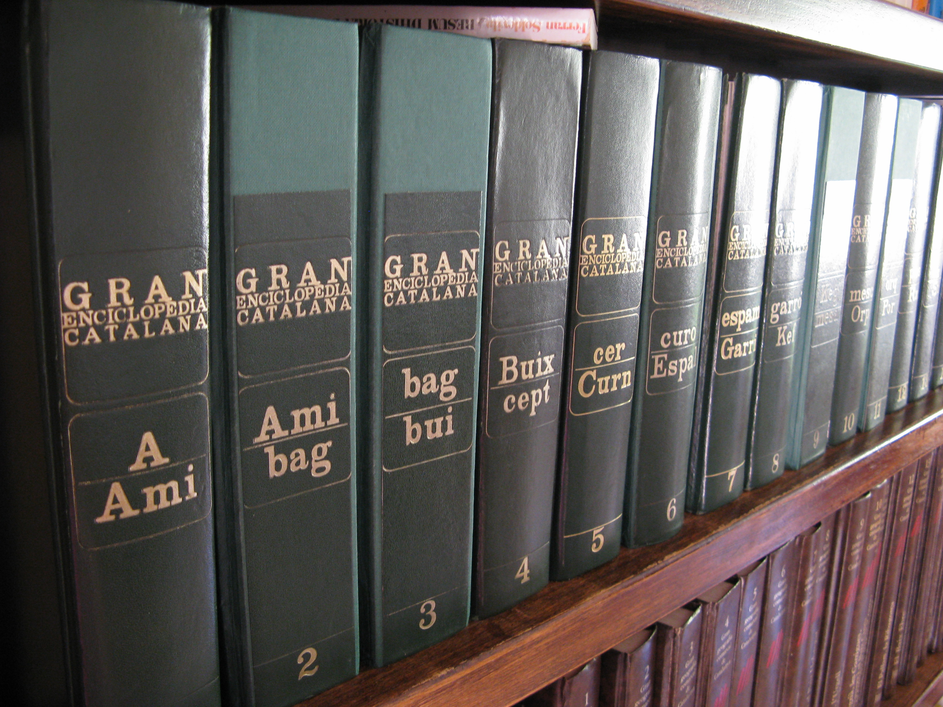 Enciclopèdia Catalana, 1. Auflage von 1970 This file has an extracted image: File:Encyclopedia Catalana 1970 001 (cropped).jpg.